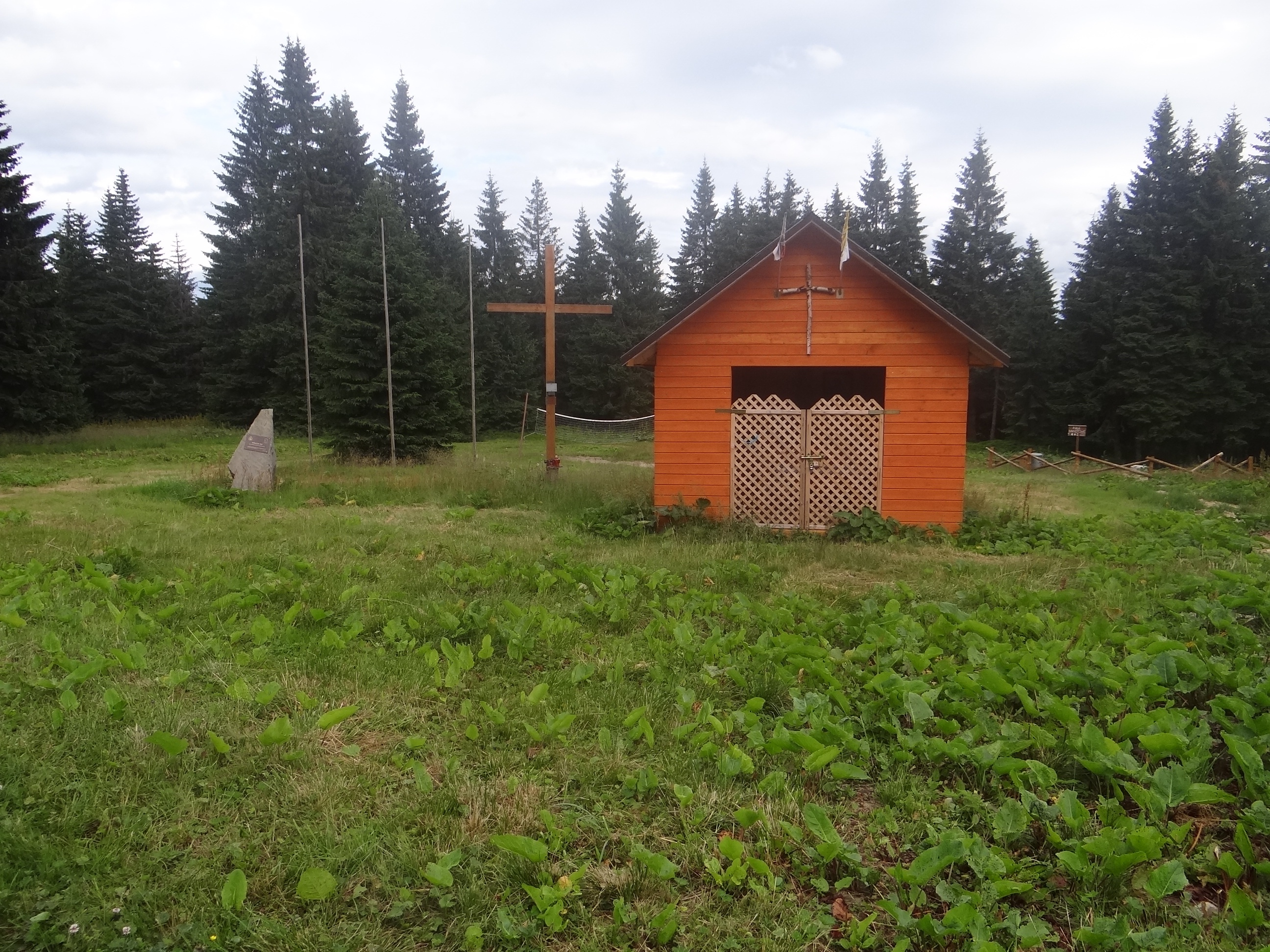 Hala Lipowska